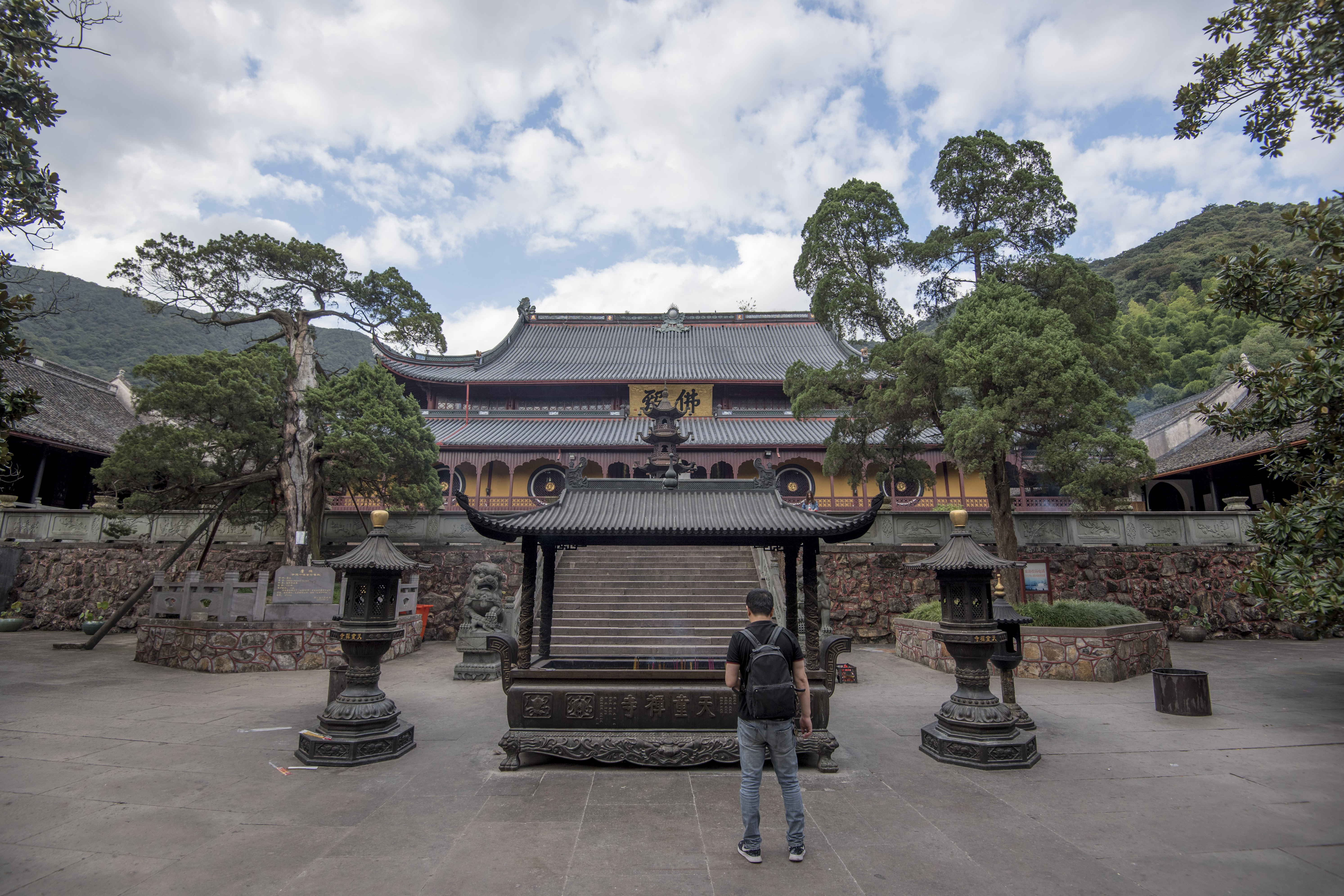 宁波天童寺